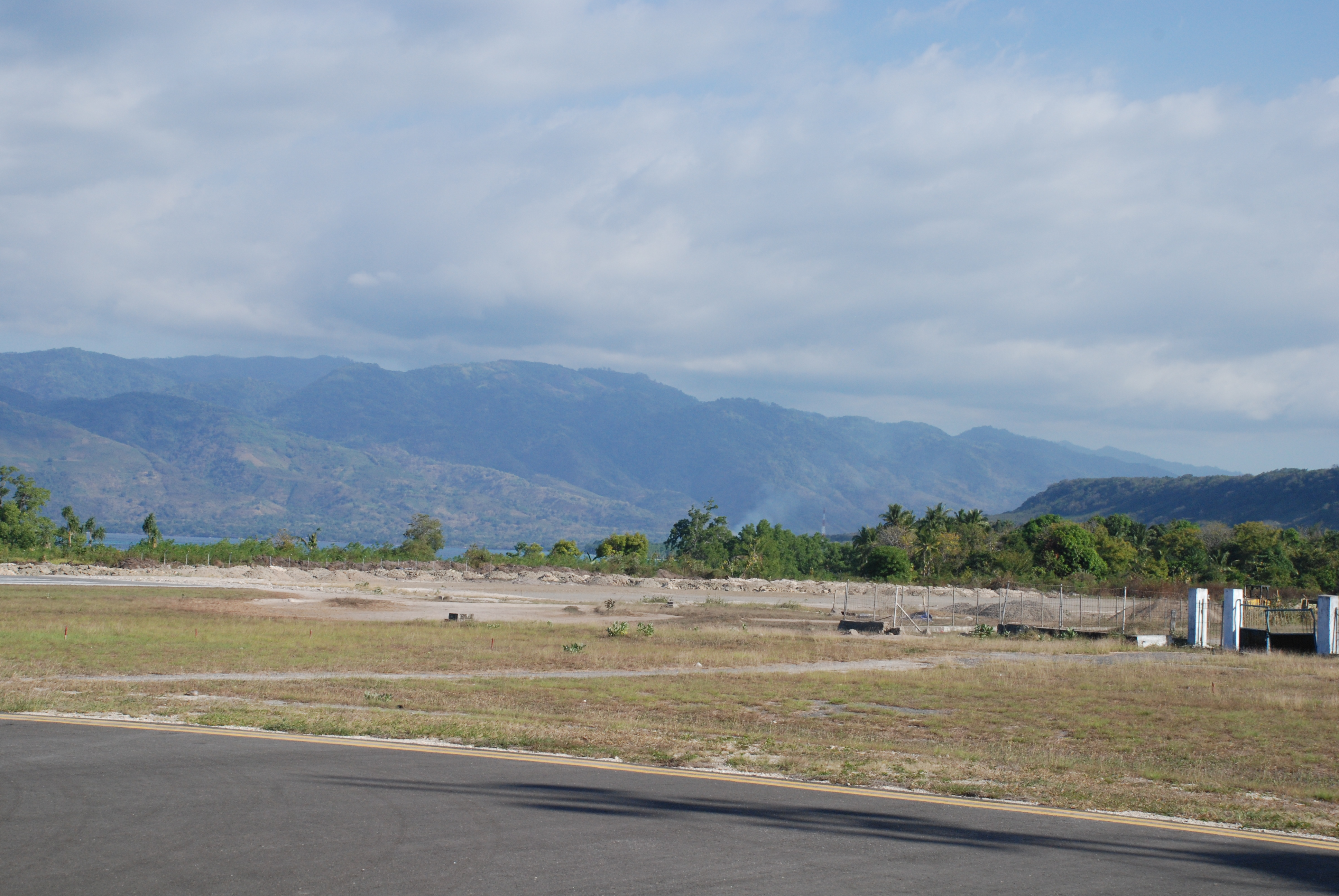 Alor Kalabahi Airport